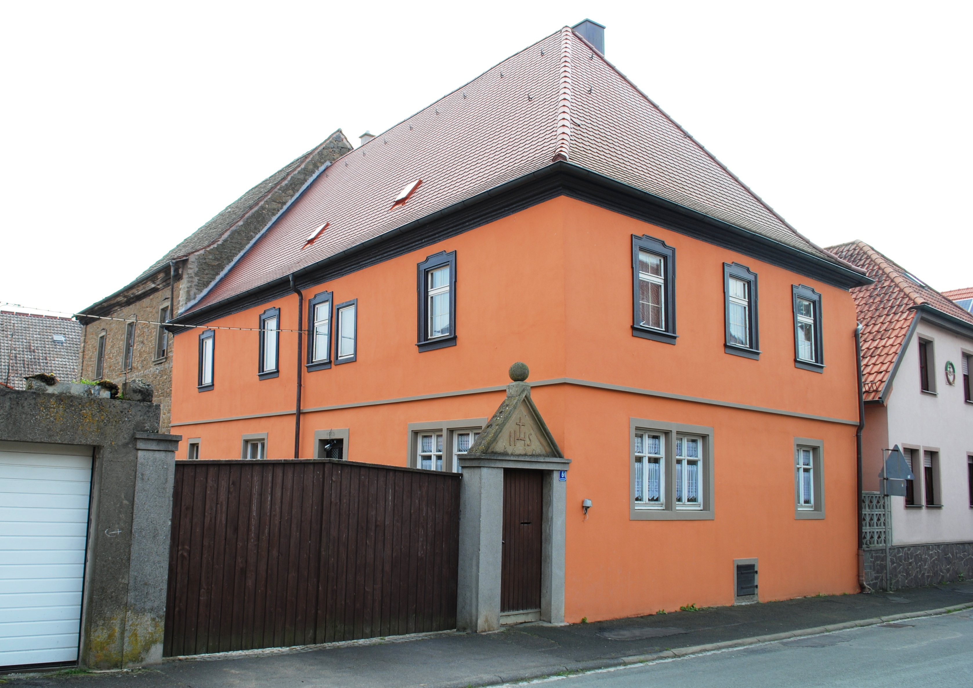 Jesuitenstraße 6, EffeldorfThis is a photograph of an architectural monument.